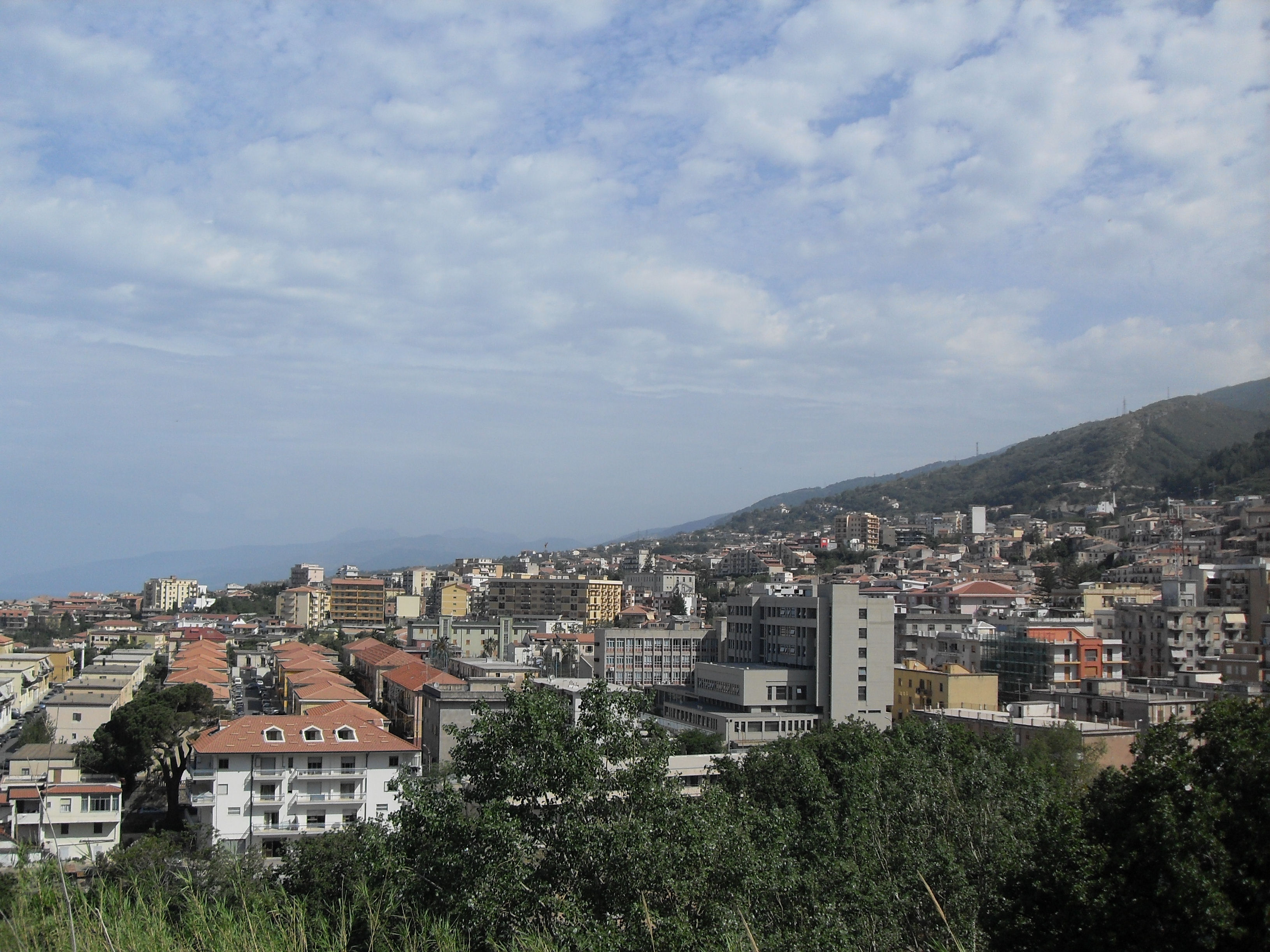 Io Luigi Salvatore Vadacchino, rilascio l'immagine Panorama_di_Paola,_Calabria_(Italia)2.JPG sotto licenza cc-by-sa 3.0 di cui sono l'autore a Wikimedia Italia, l'Immagine raffigura il Panorama della Cittadina calabrese di Paola, nonché mia città natale, provvederò io stesso a caricarla su commons, distintissimi saluti--Lodewijk Vadacchino (msg) 13:20, 14 mag 2010 (CEST)